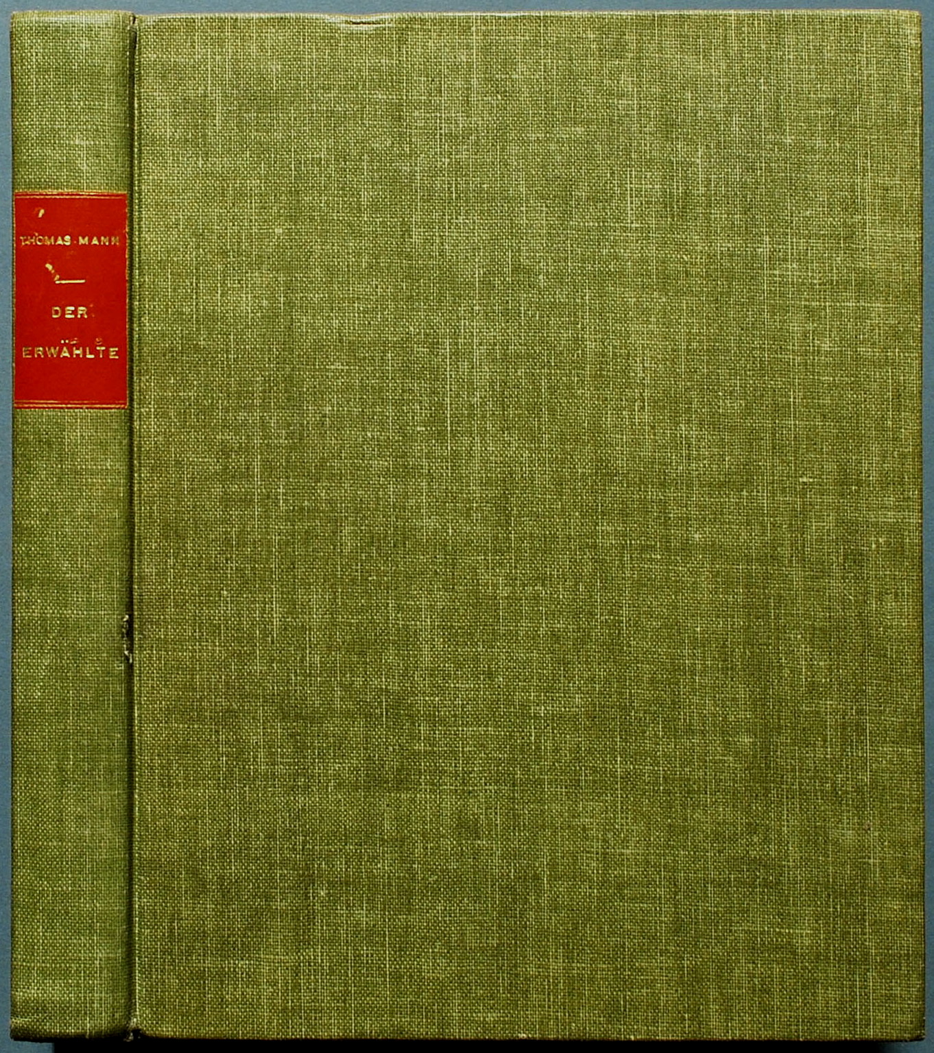 Mann, Thomas: Der Erwählte. Roman. Erstdruck. Grünes Original-Leinen Lex. 8° (18 x 22,5 cm) mit rotem Rückenschild. Vorzugsausgabe, nummeriert und signiert, Exemplar 19 von 60.